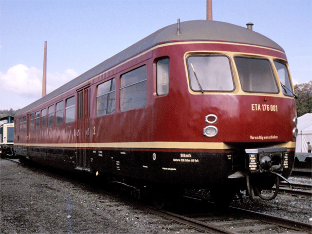 Deutsche Bundesbahn (DB) treinstel ETA176 001 op 12 oktober 1985 in Eisenbahnmuseum Bochum-Dahlhausen. Opgenomen tijdens de tentoonstelling 150 jaar spoorwegen in Duitsland